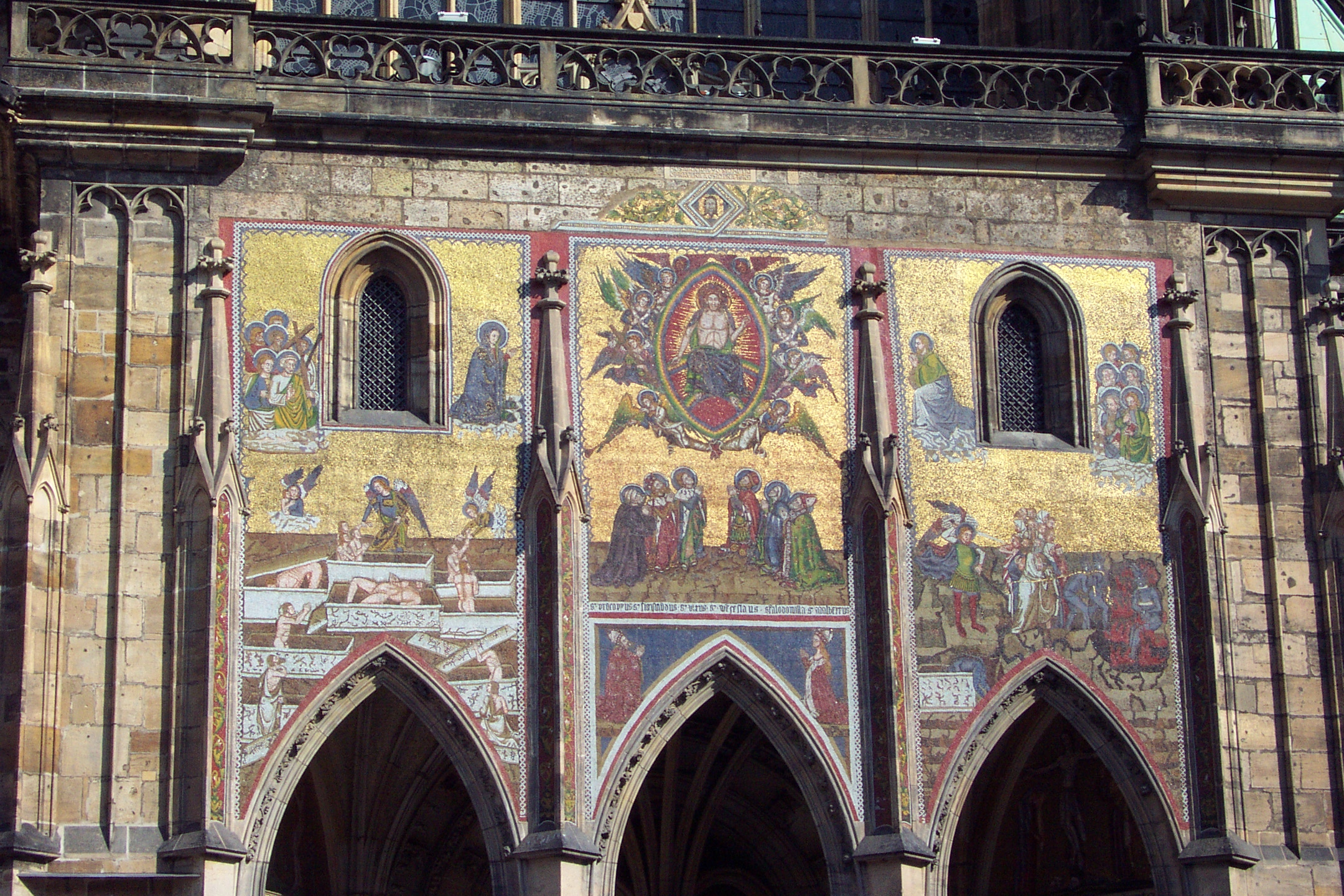 Praha, Katedrála svatého Víta, Václava a Vojtěcha, mozaika Posledního soudu